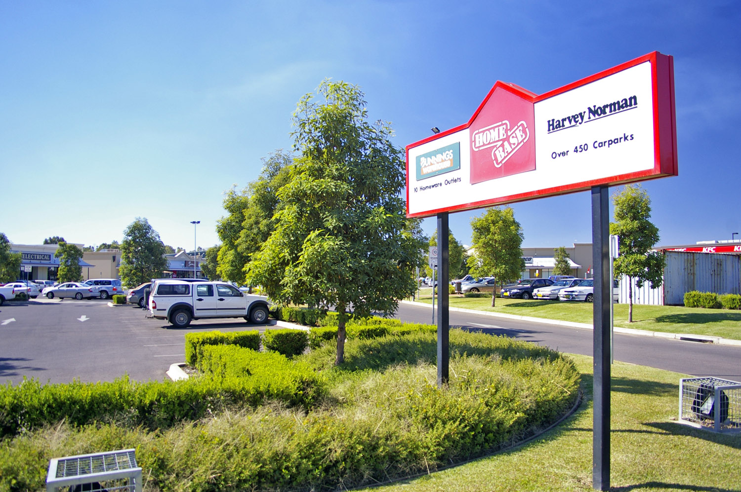 Home Base Wagga Wagga